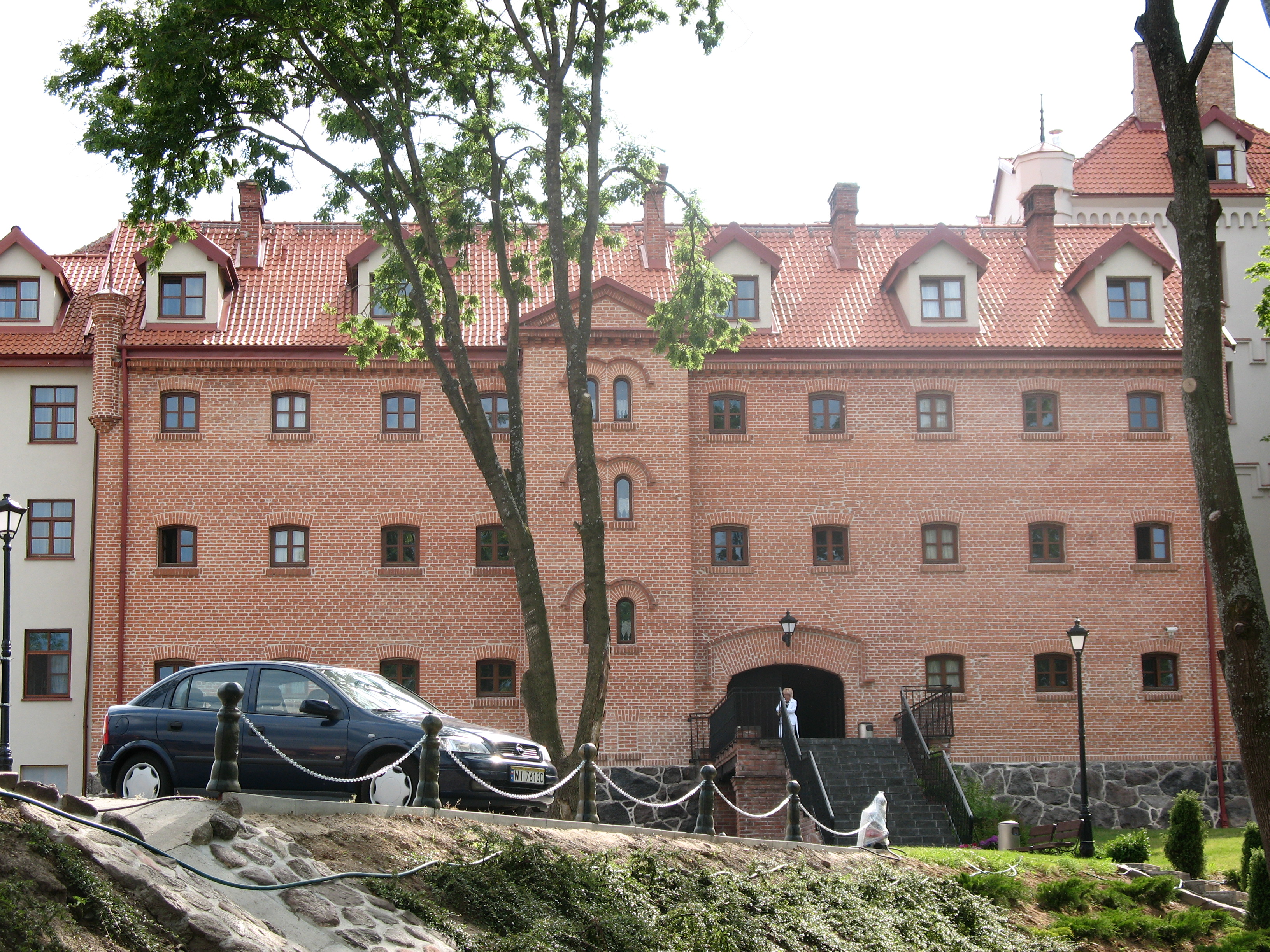 Zamek w Rynie od strony dziedzińca.